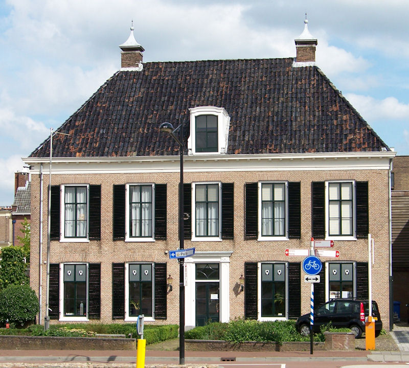 Woonhuis aan de Markt 11 in Assen, is een rijksmonument.